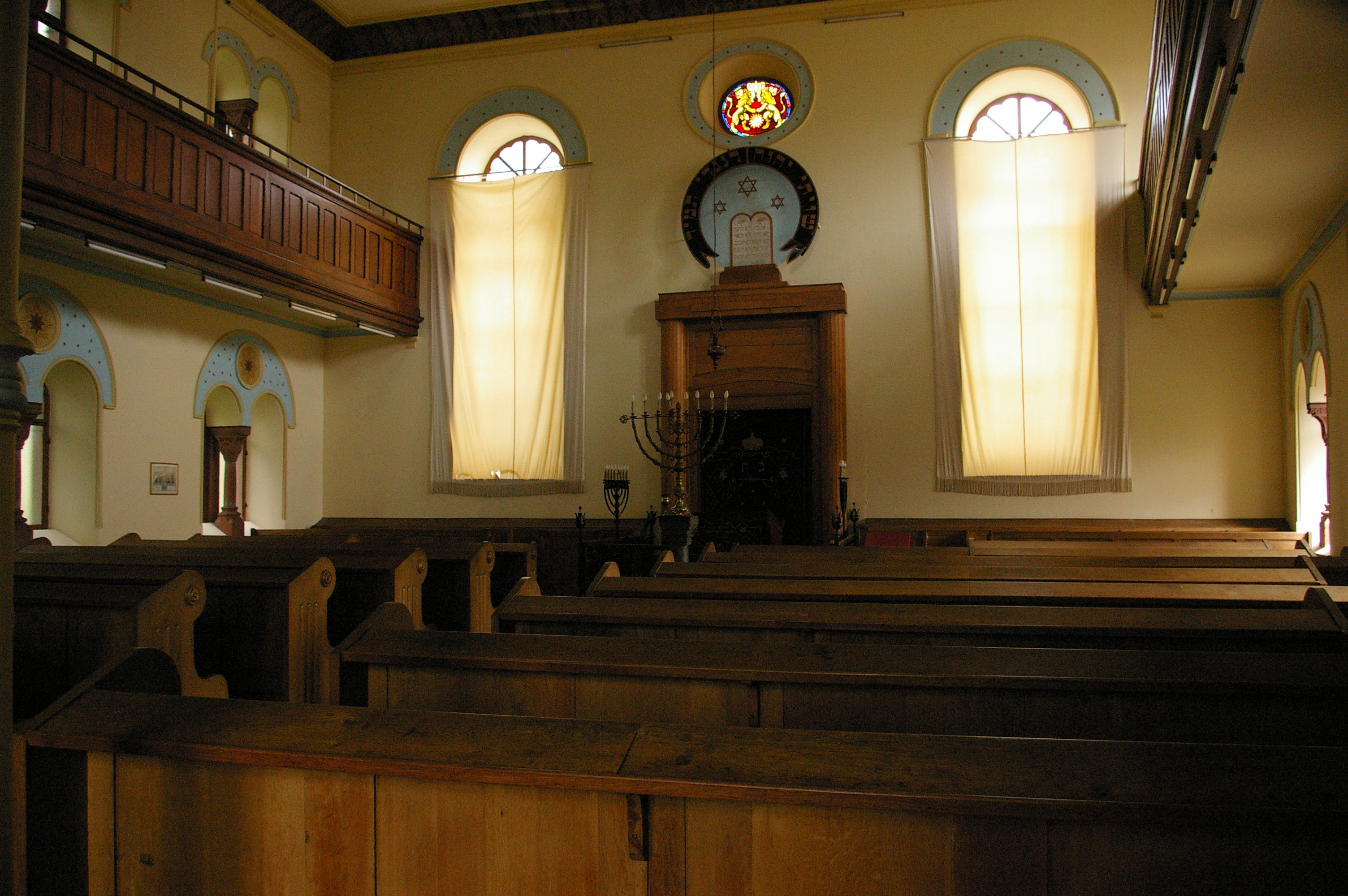 Intérieur de la synagogue d'Ingwiller, Bas-Rhin. Les galeries des femmes sont visibles sur les côtés et l'arche sainte au fond de la synagogue, protégée par un rideau.